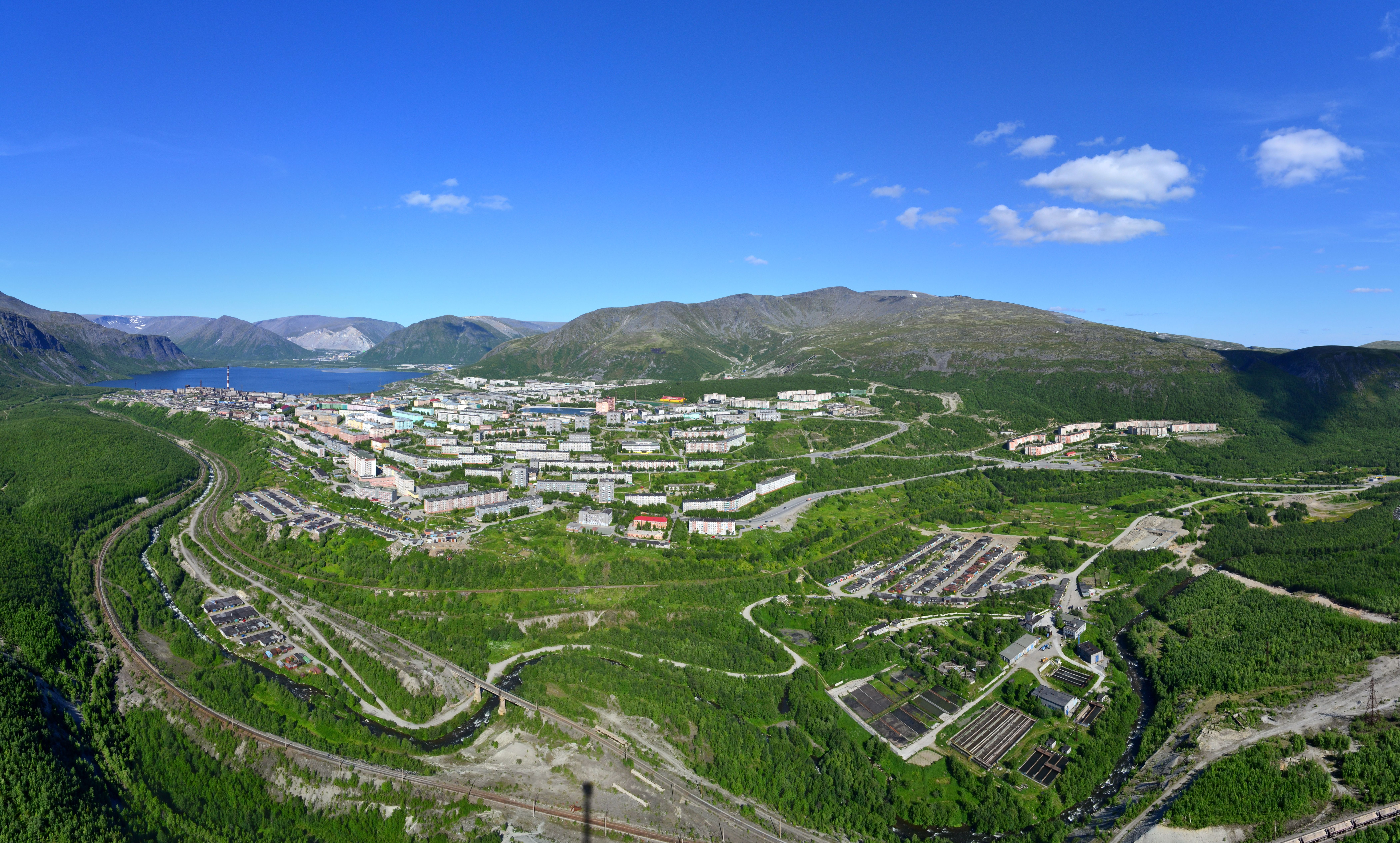 Кировск в 2012